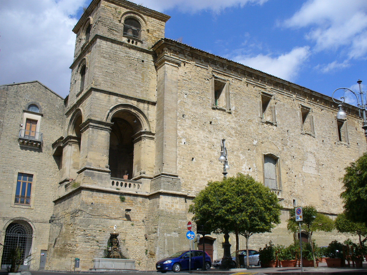 Enna: Chiesa di San Francesco d'Assisi dei Conventuali.